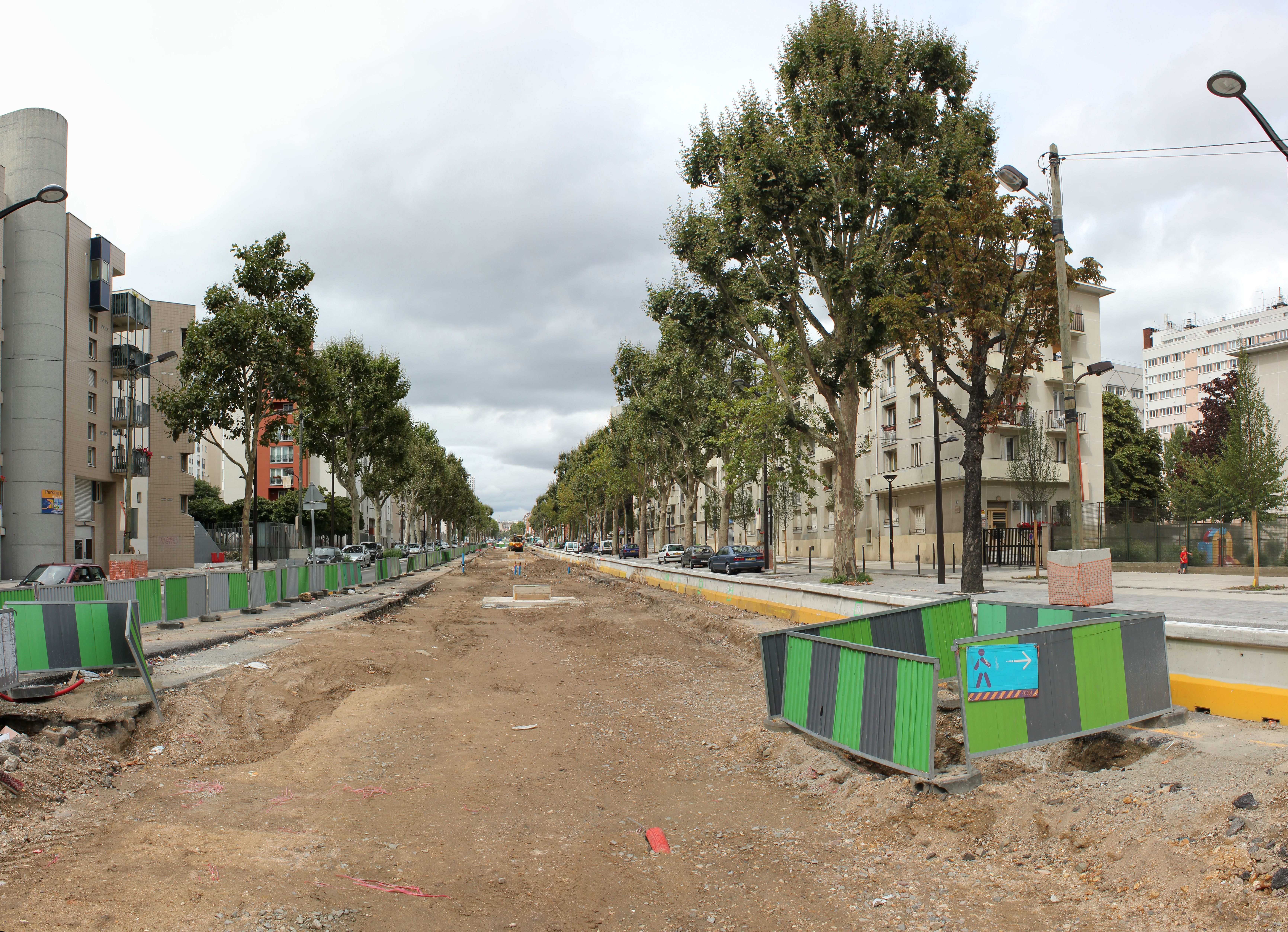 Travaux du tramway T3, dans le 20e arrondissement de Paris, France